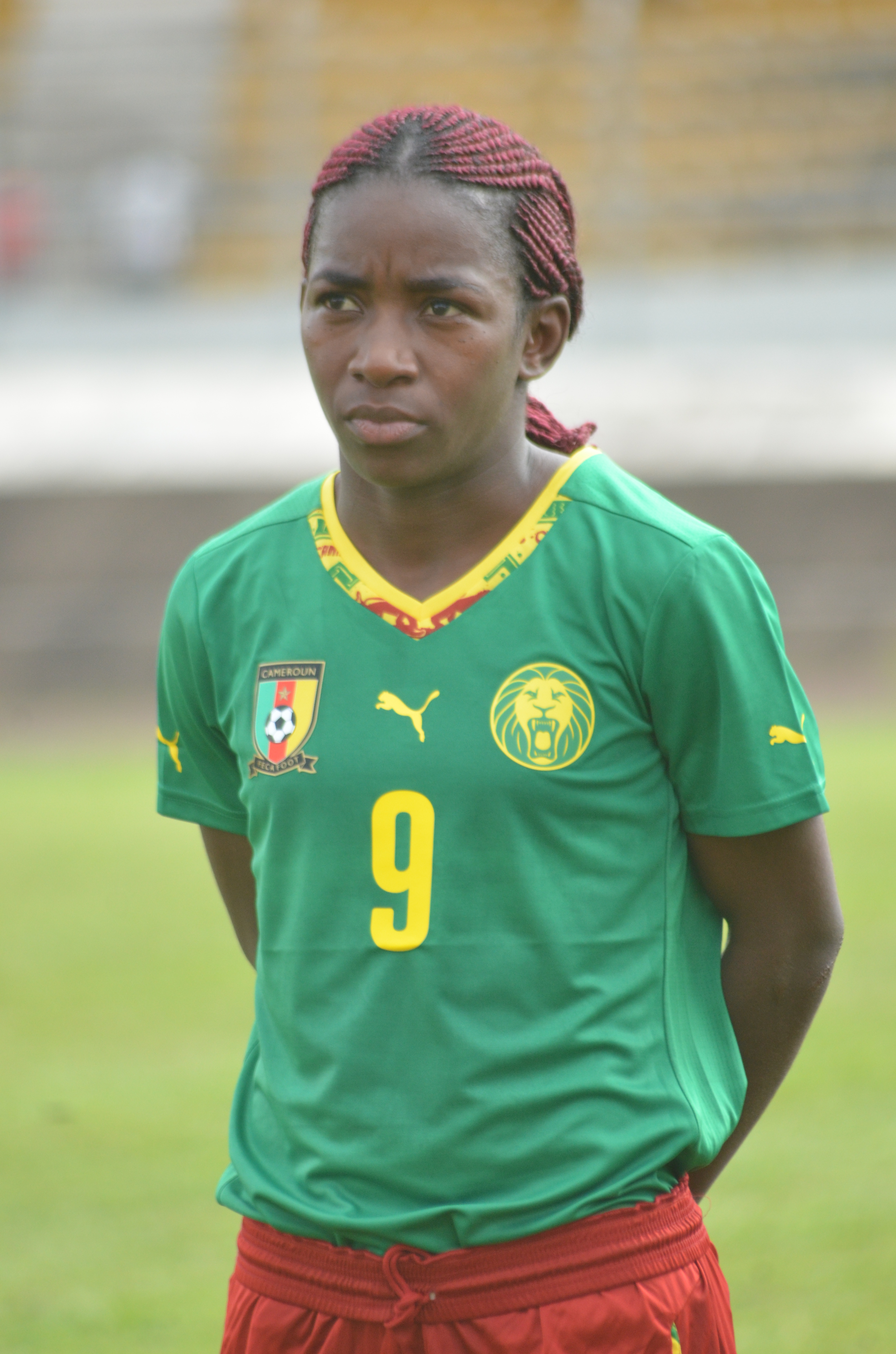 Attaquante de l'équipe de football du Cameroun